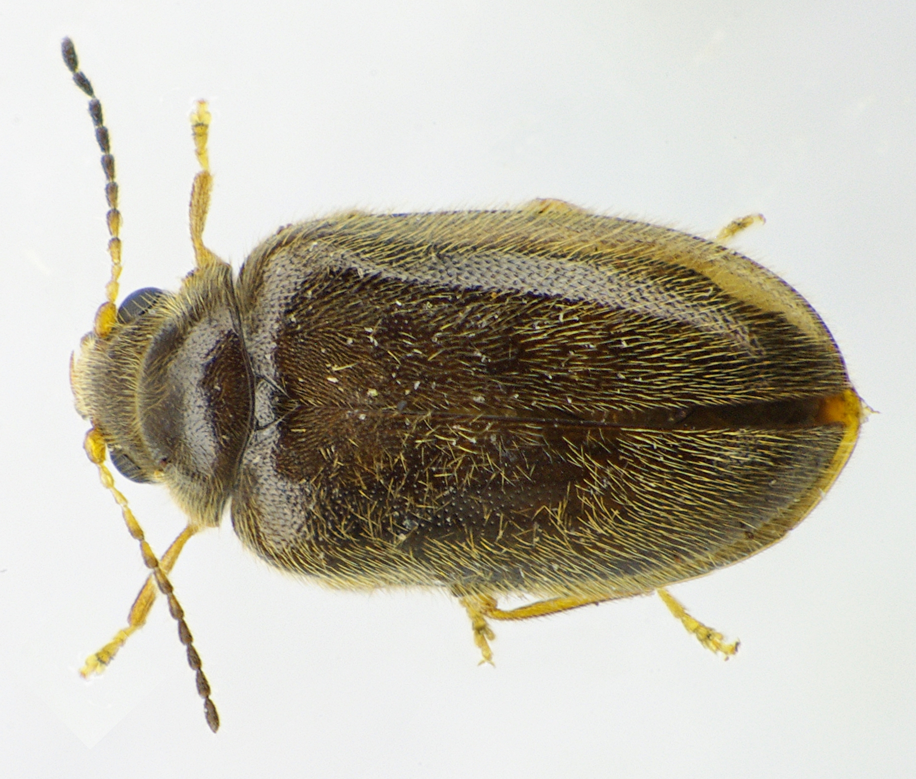 Cyphon coarctatus von Baden-Württemberg, zwischen Rottweil und Tuttlingen, 700 m hoch, an Fensterscheibe nähe Gartenteich gefunden am 7. Juli 2014